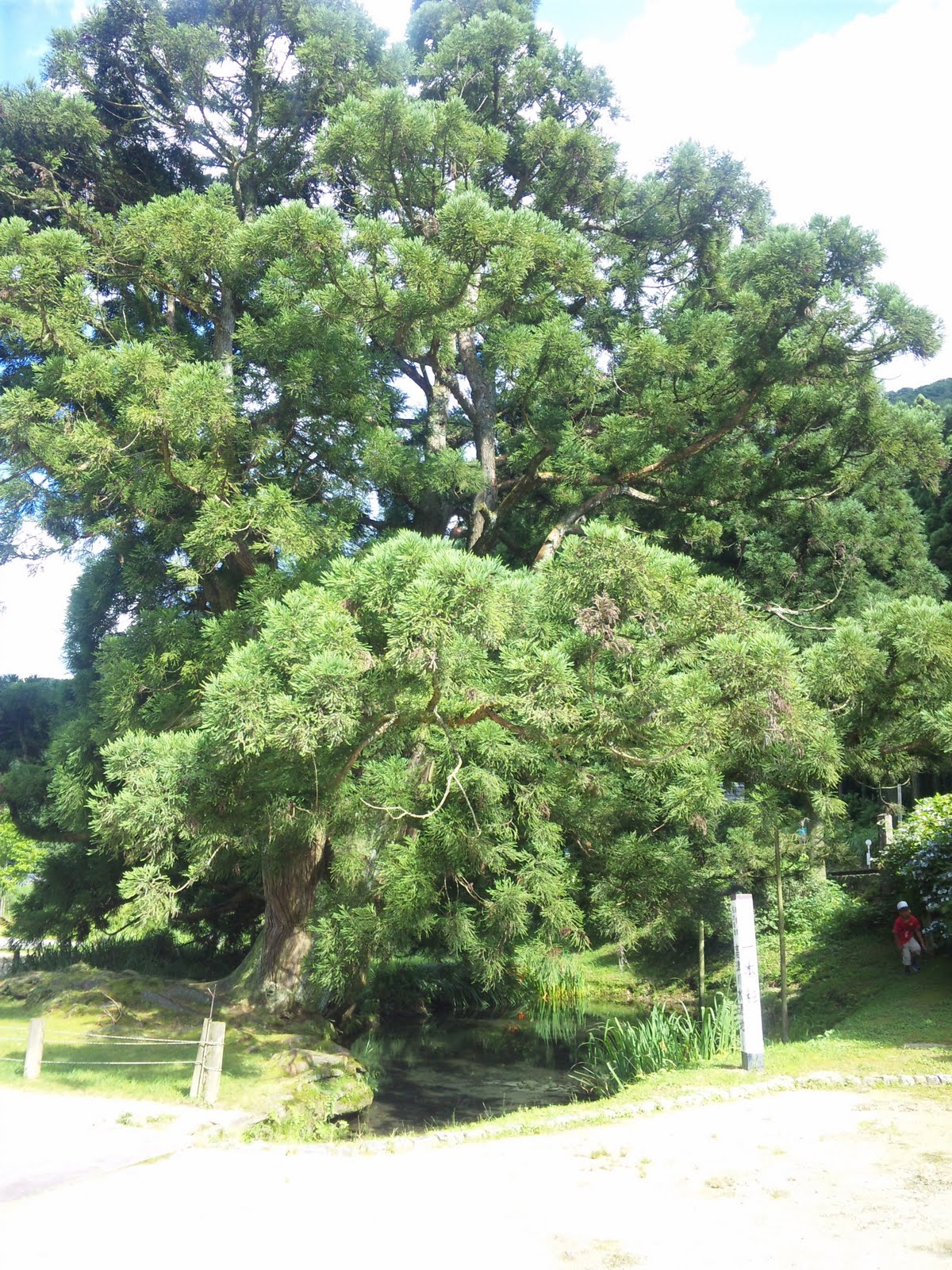 一本杉(高津川水源)